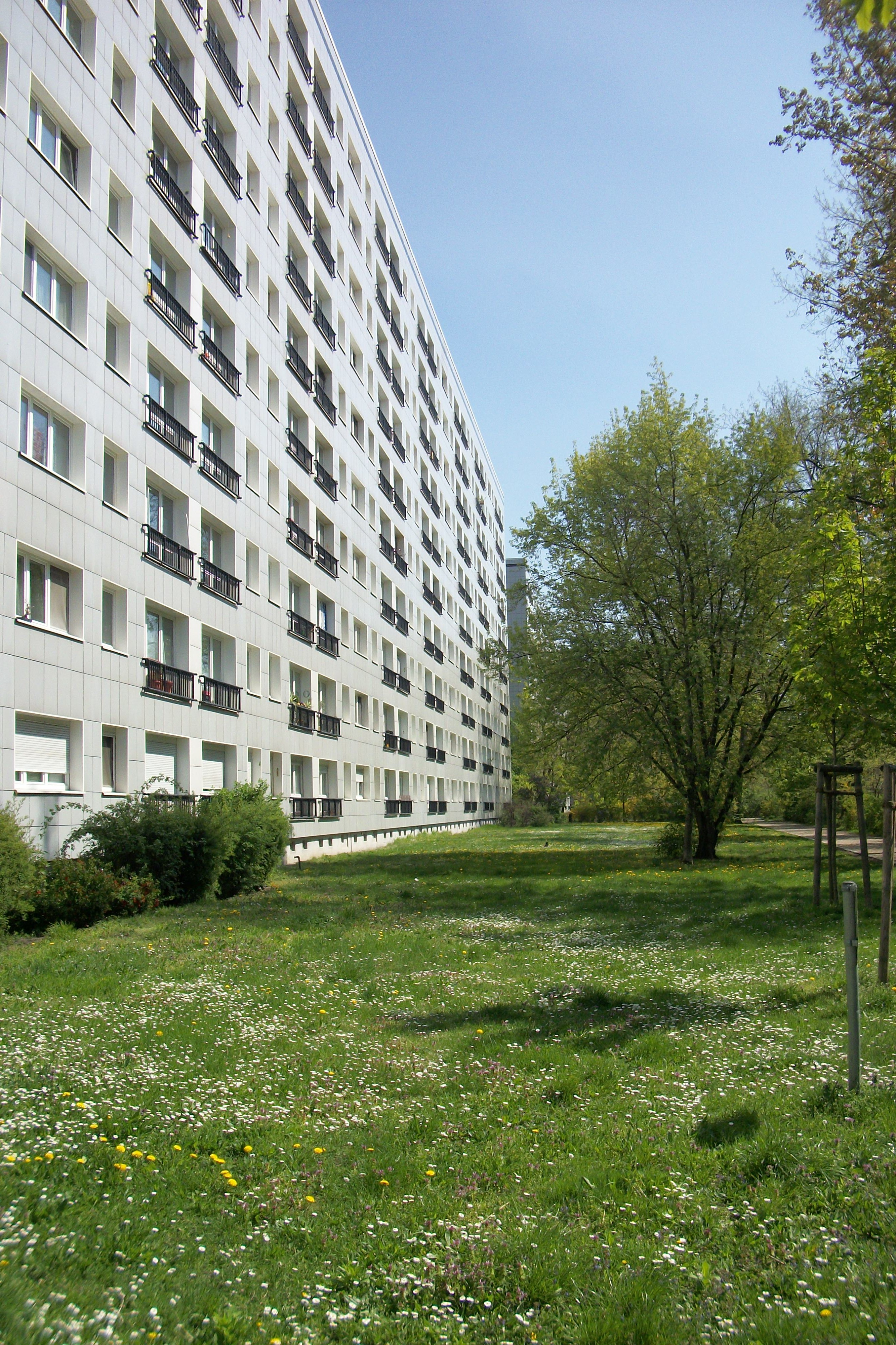 Saniert Plattenbau P2/10 in Mollstrasse, Berlin.